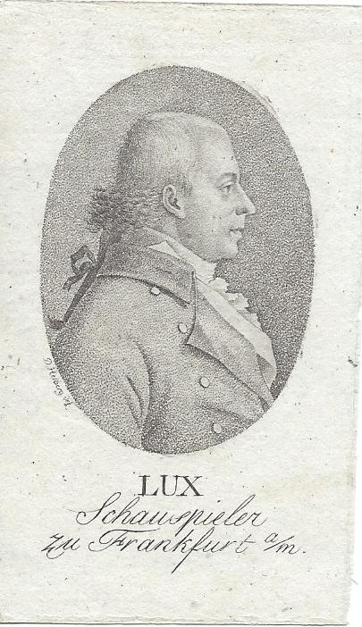 Joseph Lux (1758-1818). Punktiersich von D. Helberg um 1800.